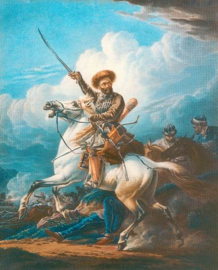 Всадник-башкир. 1823.Графика XIX - н. XX вв. из собрания Башкирского музея им. М.В.Нестерова в Строгановском дворце